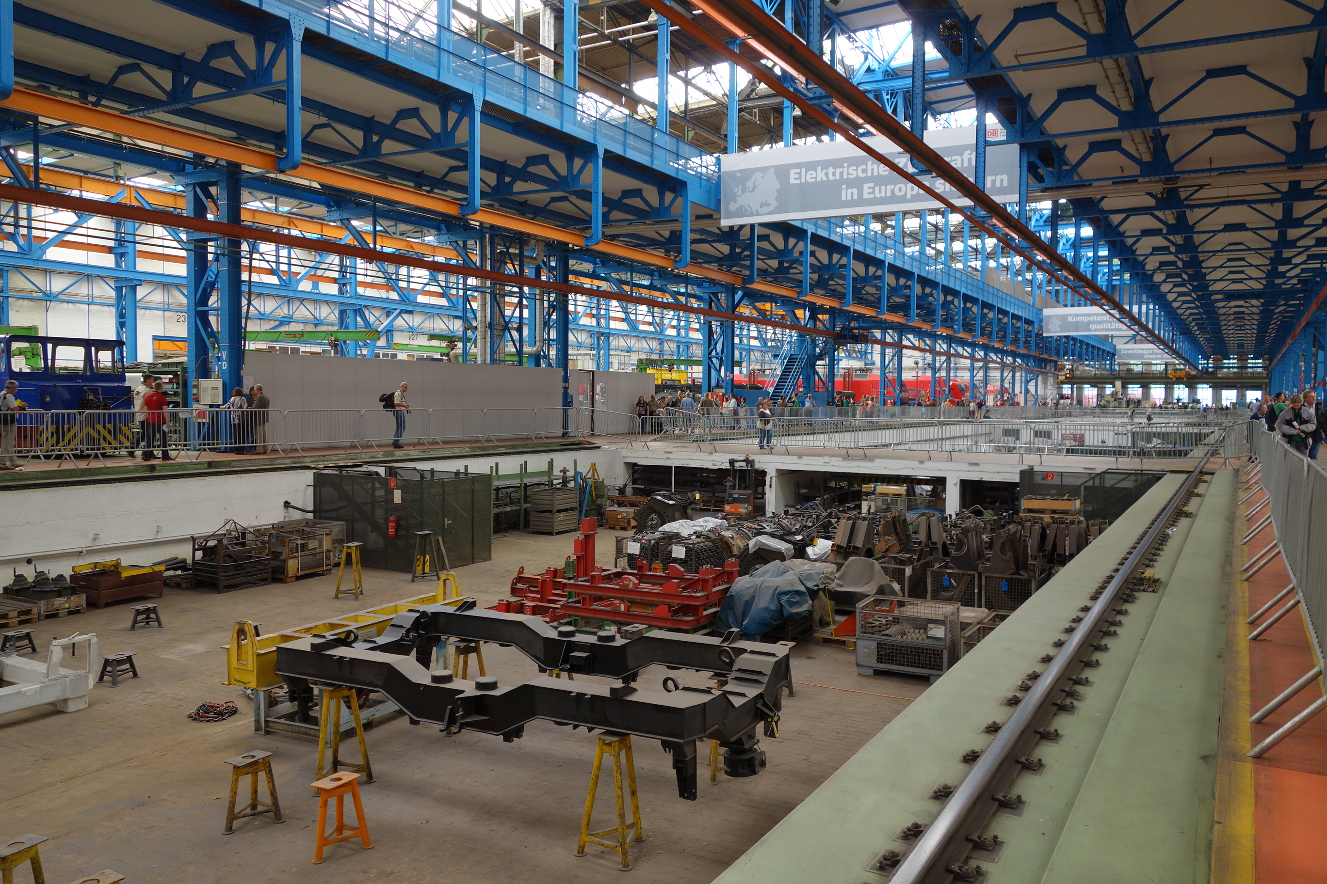 DB Fahrzeuginstandhaltung Werk Dessau, Tag der offenen Tür, Werkshalle